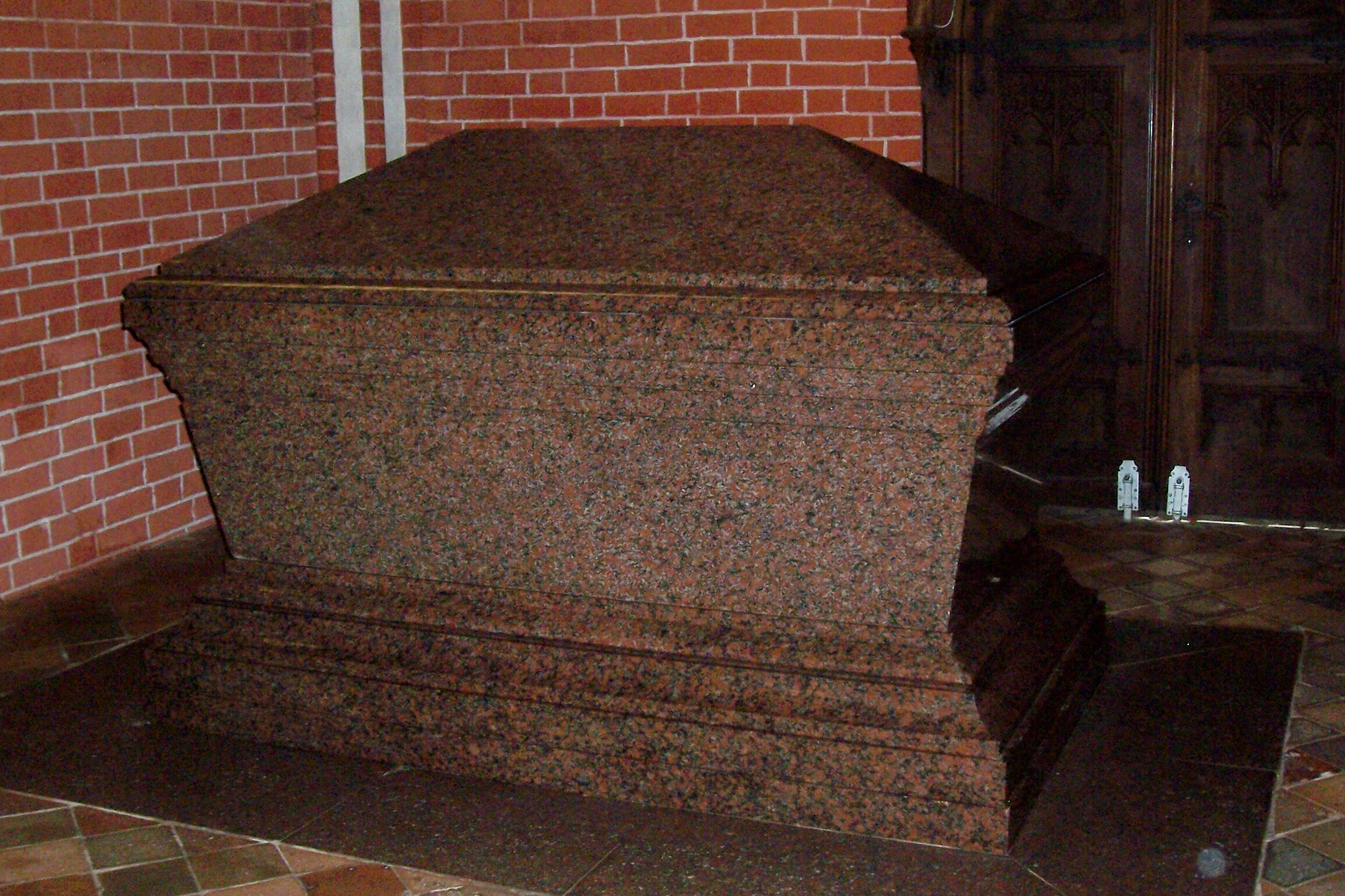 Sarkophag FriedrichFranz I. im Münster von Bad Doberan